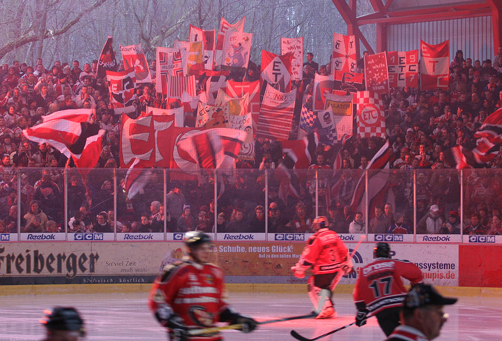 Choreografie der ETC-Fans vor einem Spiel